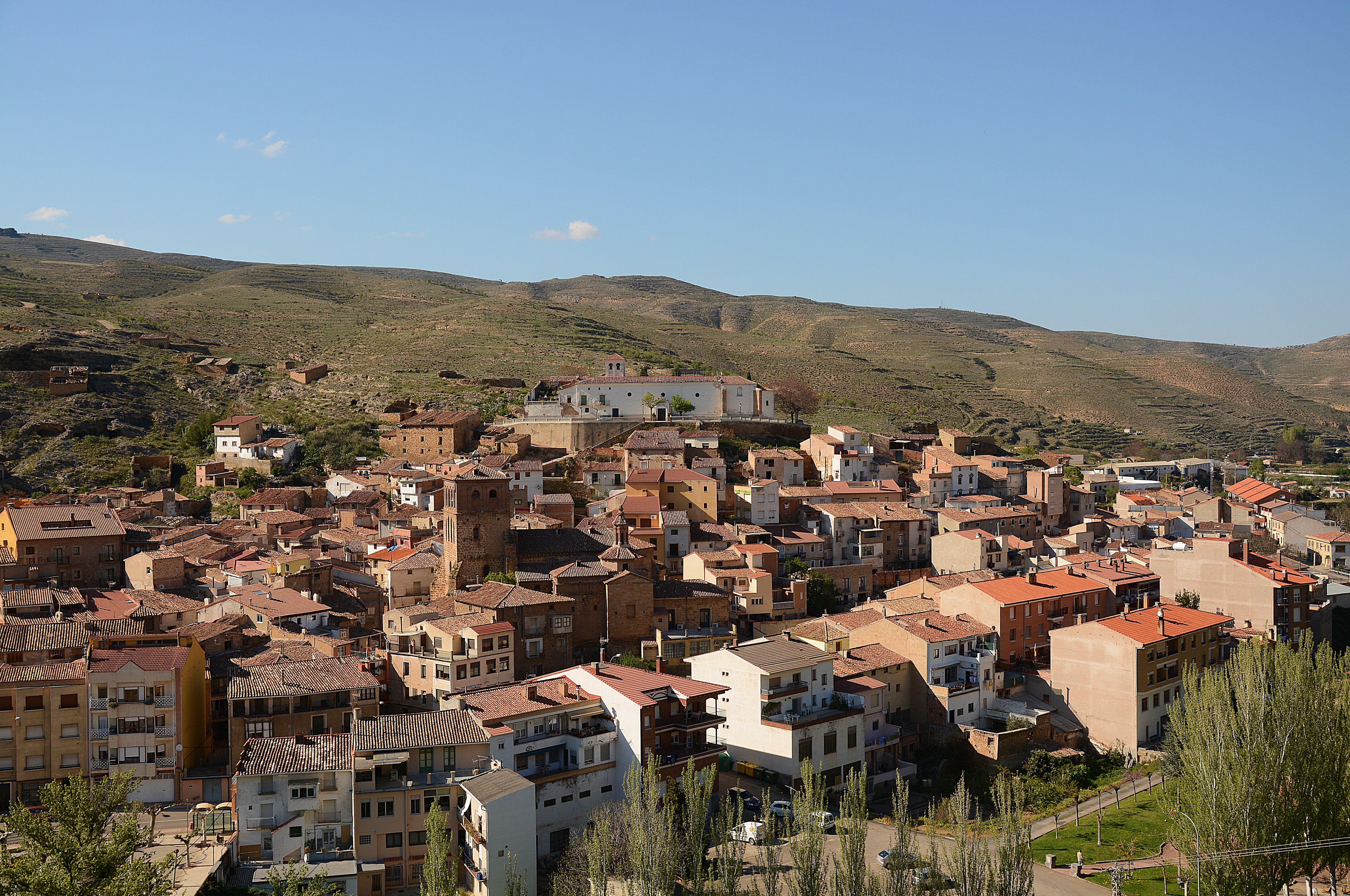 Cervera del Río Alhama